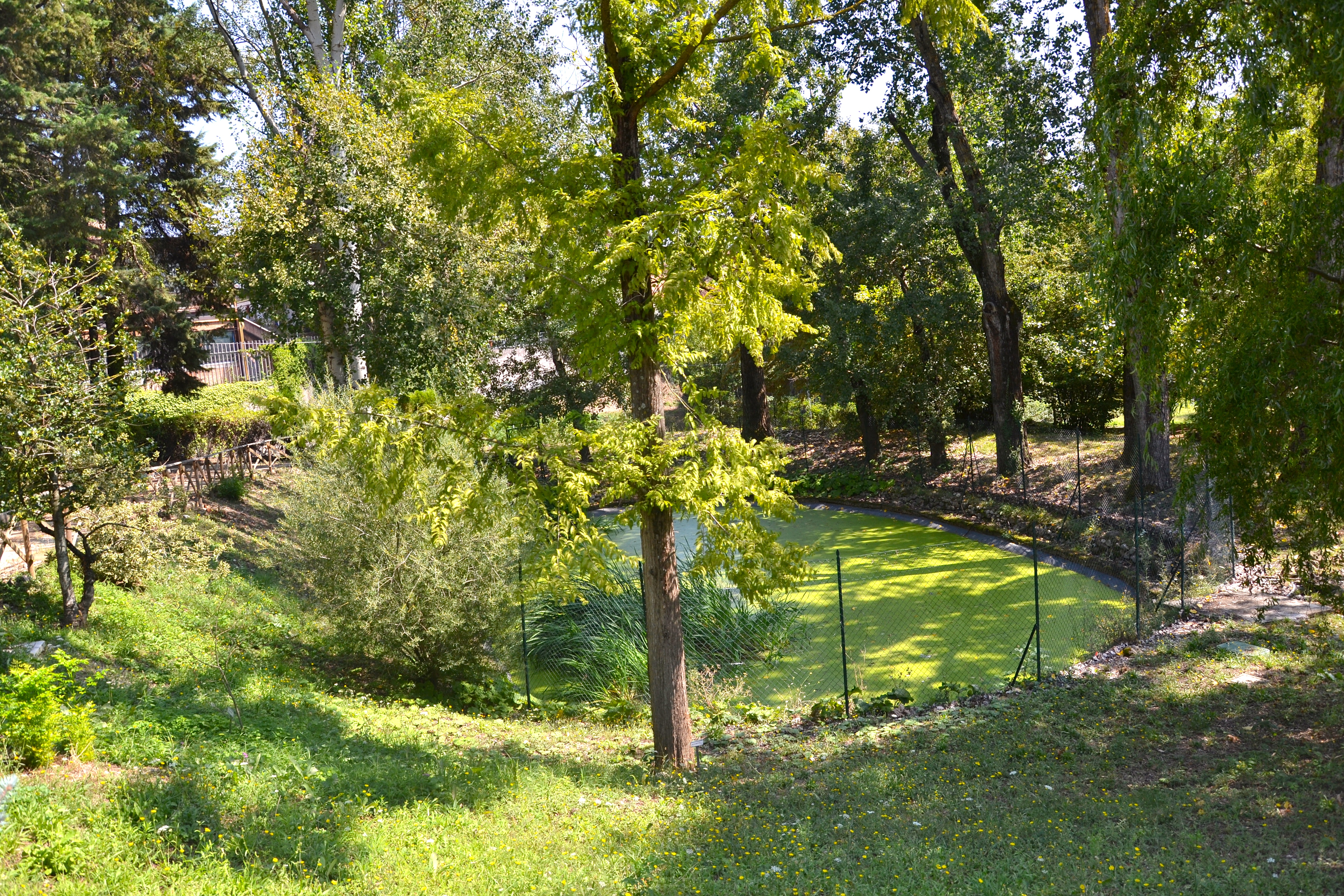 Laghetto dell'orto botanico di Perugia